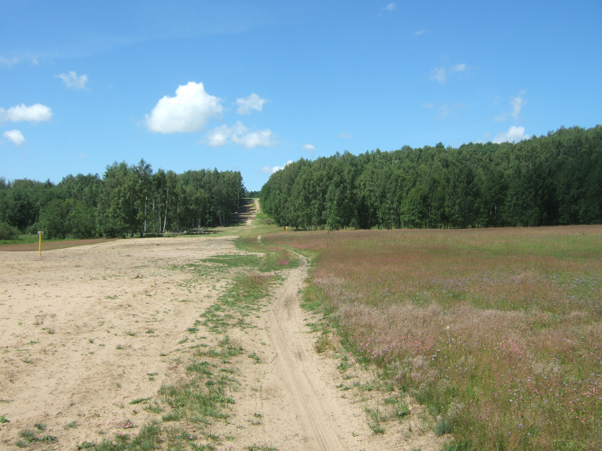 Kasinėjimų vieta Kvietiniuose (akmens amžiaus gyvenvietė)